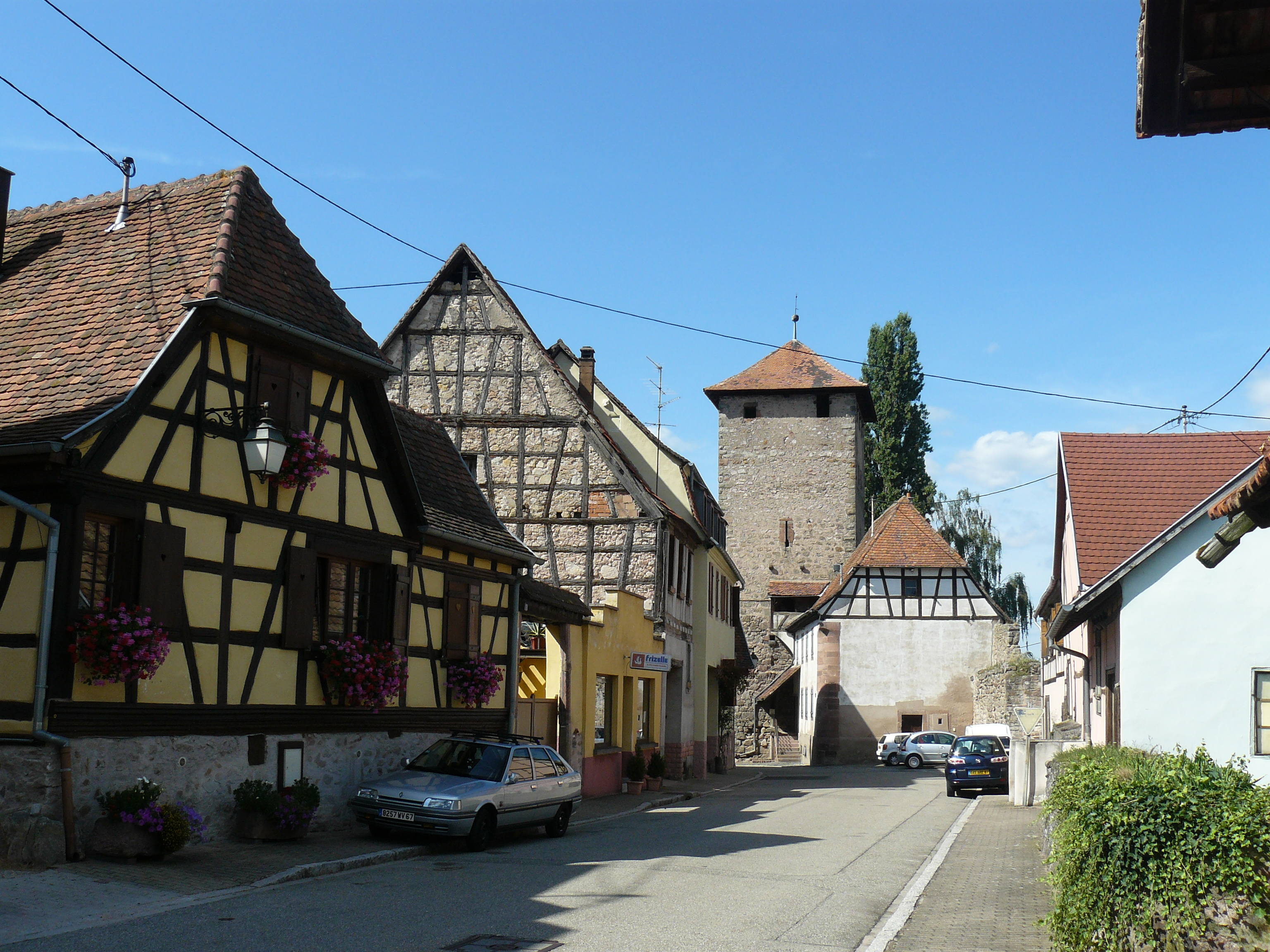 Tour-Porte d'Ebersheim vue du sud